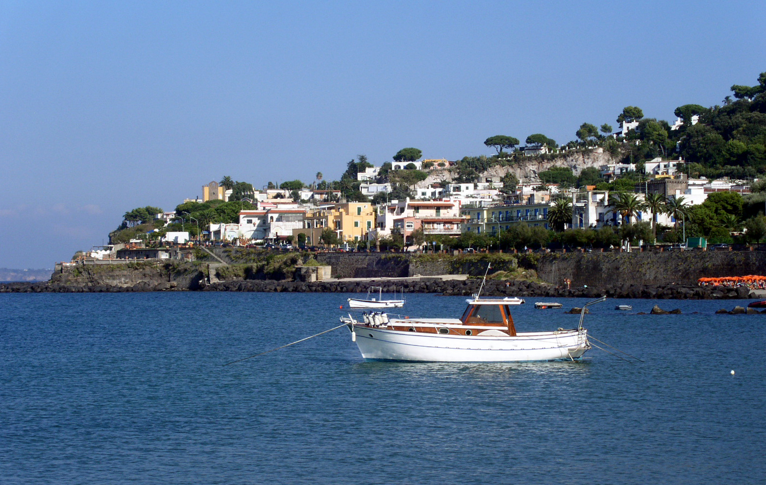 Casamicciola, Ischia, Italy.